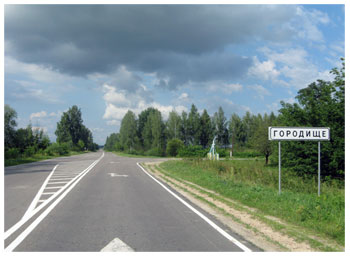 в'їзд в с. Городище